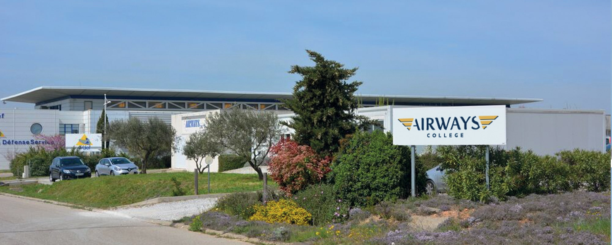 Campus d'Airways College à Nîmes